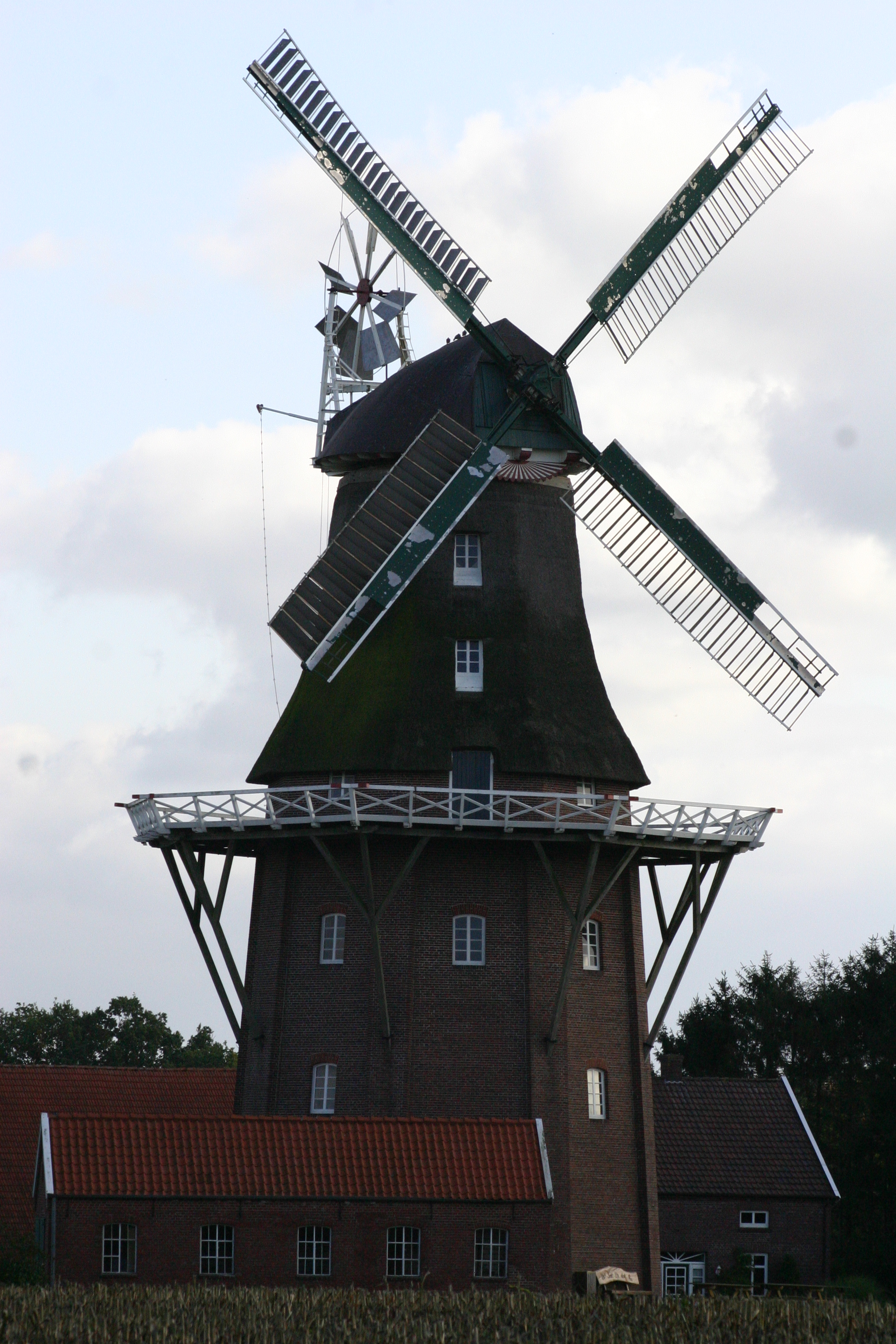 Mühle in Holtland